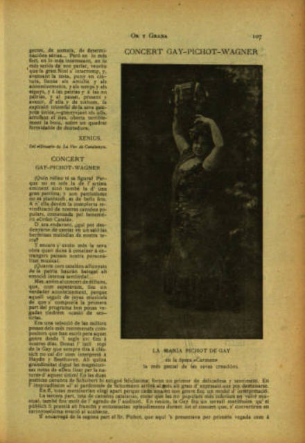 pàgina on apareix un acte d'or y grana